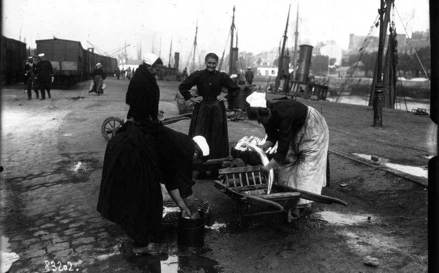 Vendeuses de poisson sur le port de Lorient en 1920